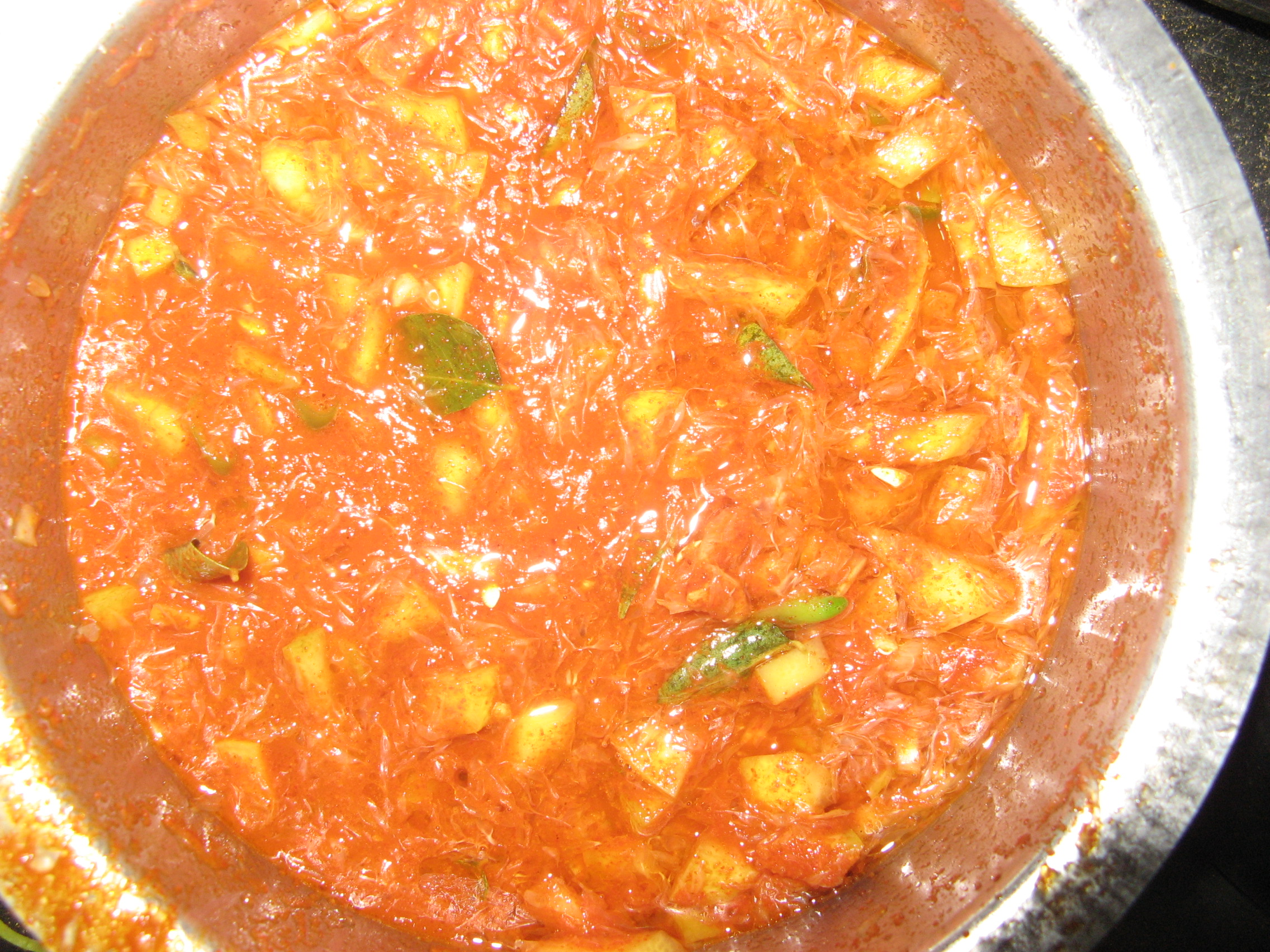 നാരങ്ങ അച്ചാർ